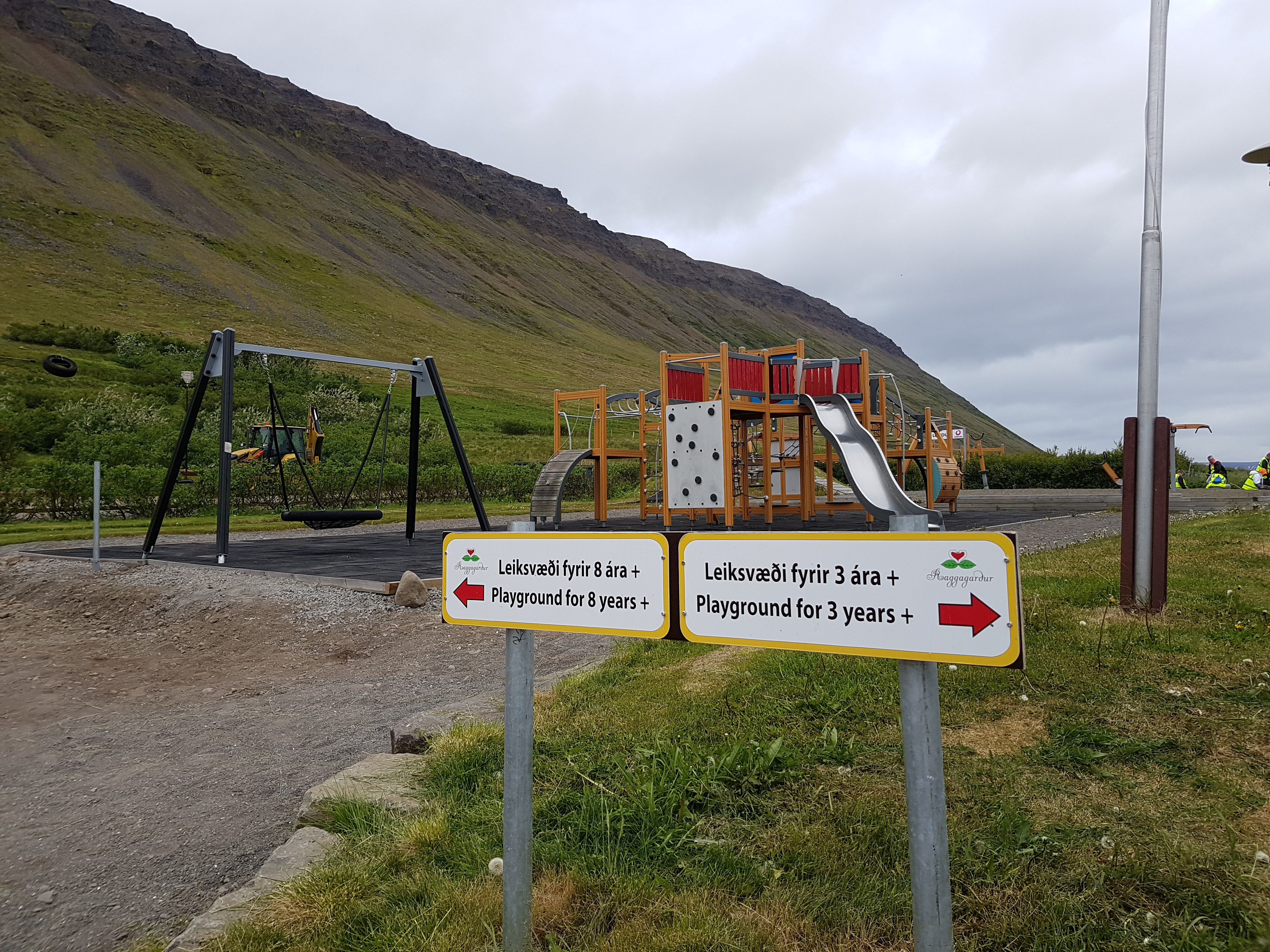 Raggagarður í Súðavík.